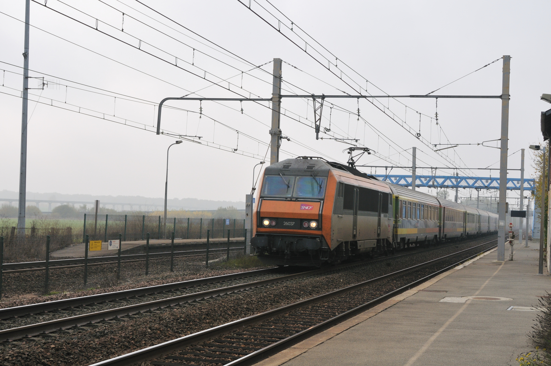 Passage d'un train en direction de Paris en gare de Chevilly, Loiret, France